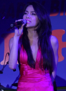 Chân dung ca sĩ Hồ Ngọc Hà